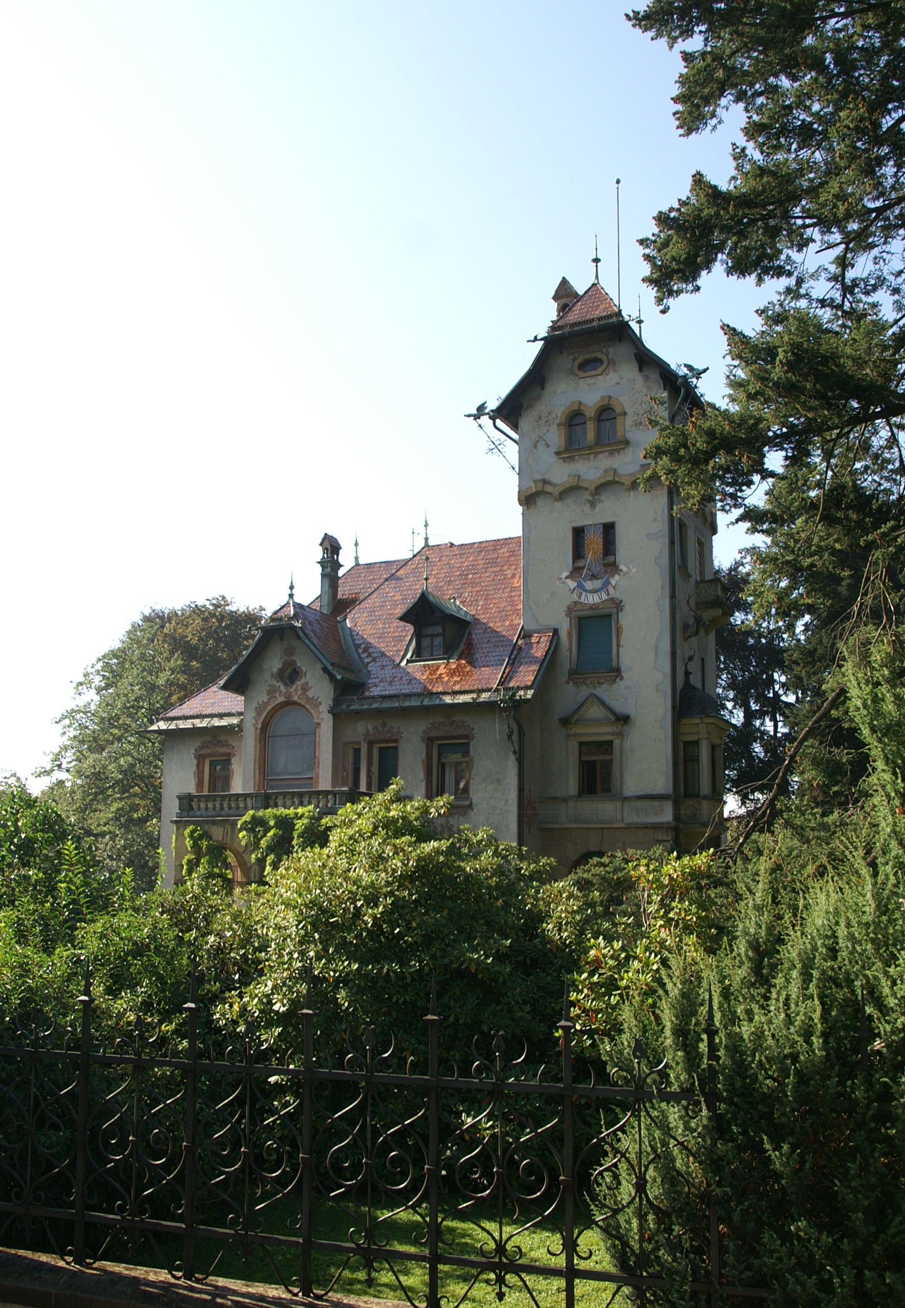 aus dem DEHIO Vorarlberg 1983: Dr.-Waibel-Strasse Nr.14: Villa, erbaut 1890/92 von Architekt Julius Rhomberg und dem Baumeister J.A.Albrich. Mehrgliedriger Bau mit Schopfwalmdach, angehängten Bauteilen; Erker mit Zwiebelhelm, Terasse, bergfriedartiger Turm mit Krüppelwalmdach (oberster Teil vorkragend auf Arkaden); Lüftlmalerei; Park mit originaler Einfriedung (Toreinfahrt in Art eines Treppengiebels (originaler Zaun, bezeichnet 1892). In Dornbirn, Oberdorf. Dr. Renate Madritsch, Landeskonservatoriat für Vorarlberg Dornbirn, Dr. Waibelstraße 14; Die zu den Fabriken gehörigen Fabrikantenvillen in der Dr.-Waibel-Straße in Dornbirn bestechen durch ihre eklektische für die Bauzeit typische Gestaltung und ihre Lage inmitten großzügig angelegter Parks mit exotischem Baumbestand. Die Villa Guntram Hämmerle (1862-1923), jüngster Sohn des Firmengründers F.M. Hämmerle wurde 1890 bis 92 von den Architekten Julius Rhomberg und J.A. Albrich im feudalen sogenannten altdeutschen Stil mit zahlreichen Zitaten aus der deutschen Renaissance, erbaut. Zu den Textilwerken Hämmerle gehörten die Weberei Dornbirn Weppach, die Färberei in Dornbirn Steinebach und die Spinnerei Gütle. Später kamen die Spinnerei Feldkirch Gisingen, die Webereien Dornbirn Sägen und Eulental hinzu (heute Eleonore Rhomberg). Diese Villa wird noch von den Nachfahren des Firmengründers bewohnt.